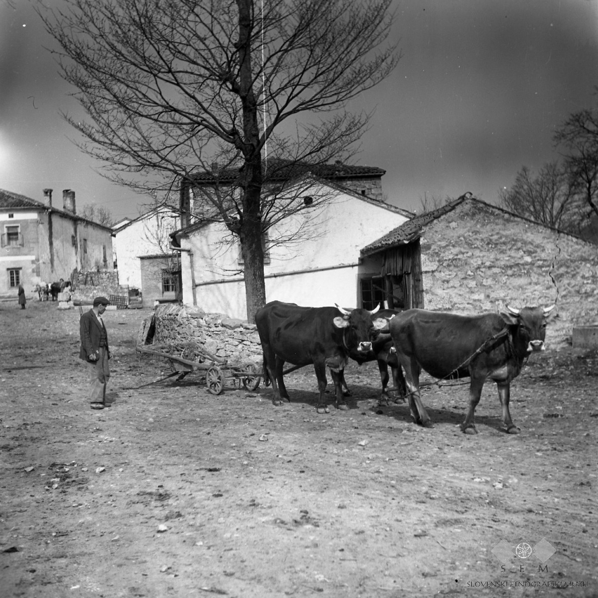 Orač na poti na njivo, Hrušica.